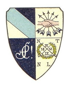 Wappen des Corps Saxonia Leipzig